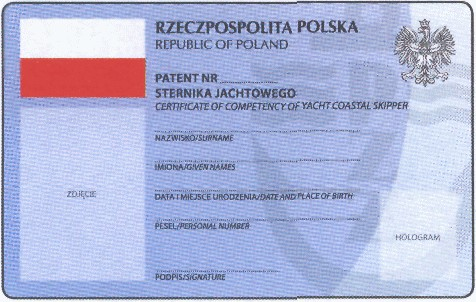 Awers patentu sternika jachtowego z 2006 roku.